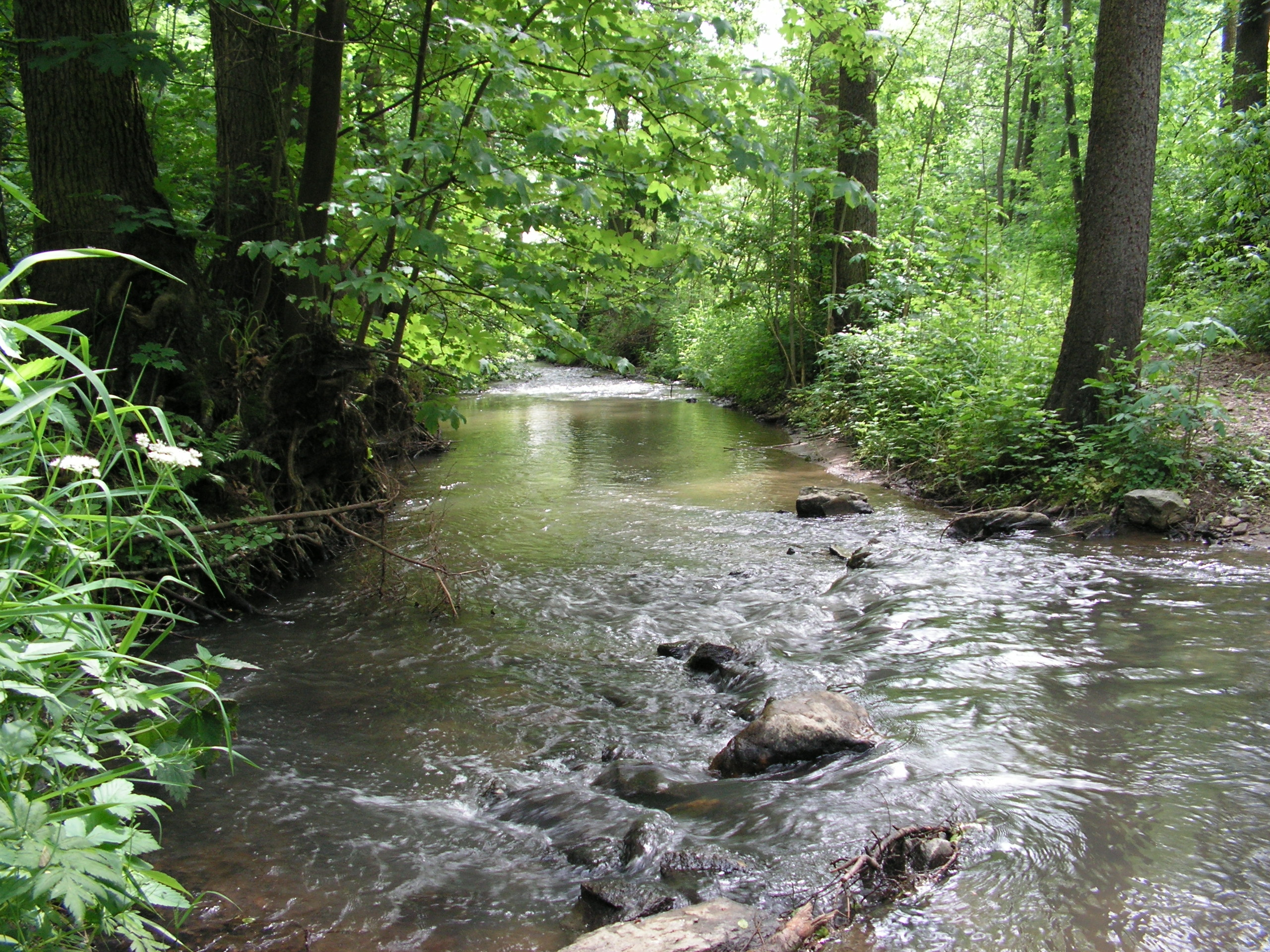 Ostrovský potok u Zruče nad Sázavou.